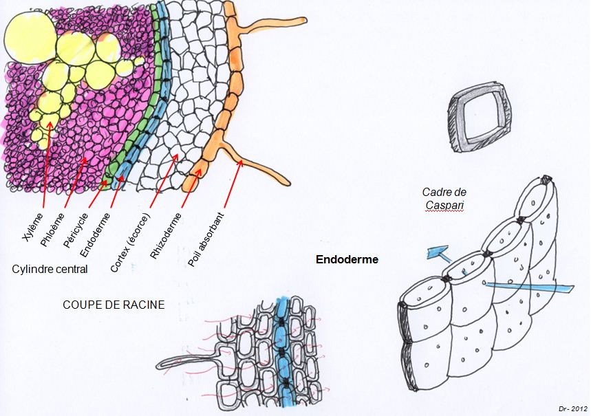 Schéma des Cadres de Caspary dans une coupe transversale de racine.